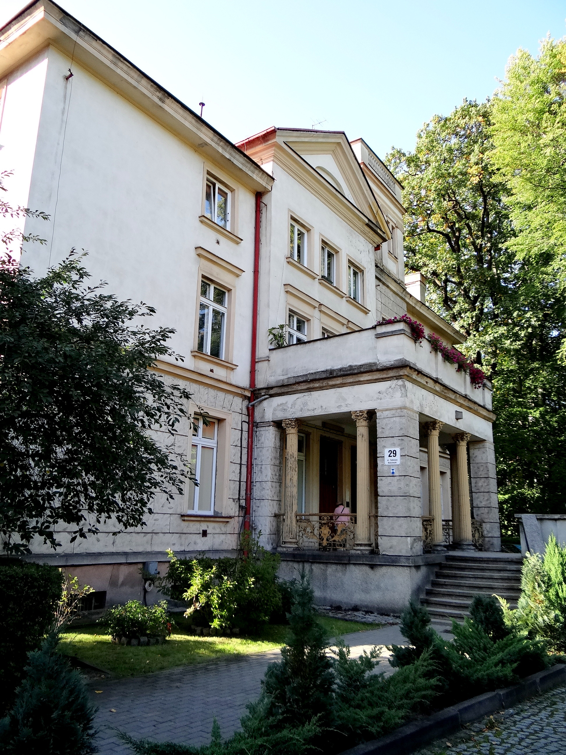 Sopot Dolny, ul. Kościuszki 29 - willa Herbstów, 1878, 1891-1896, 1910